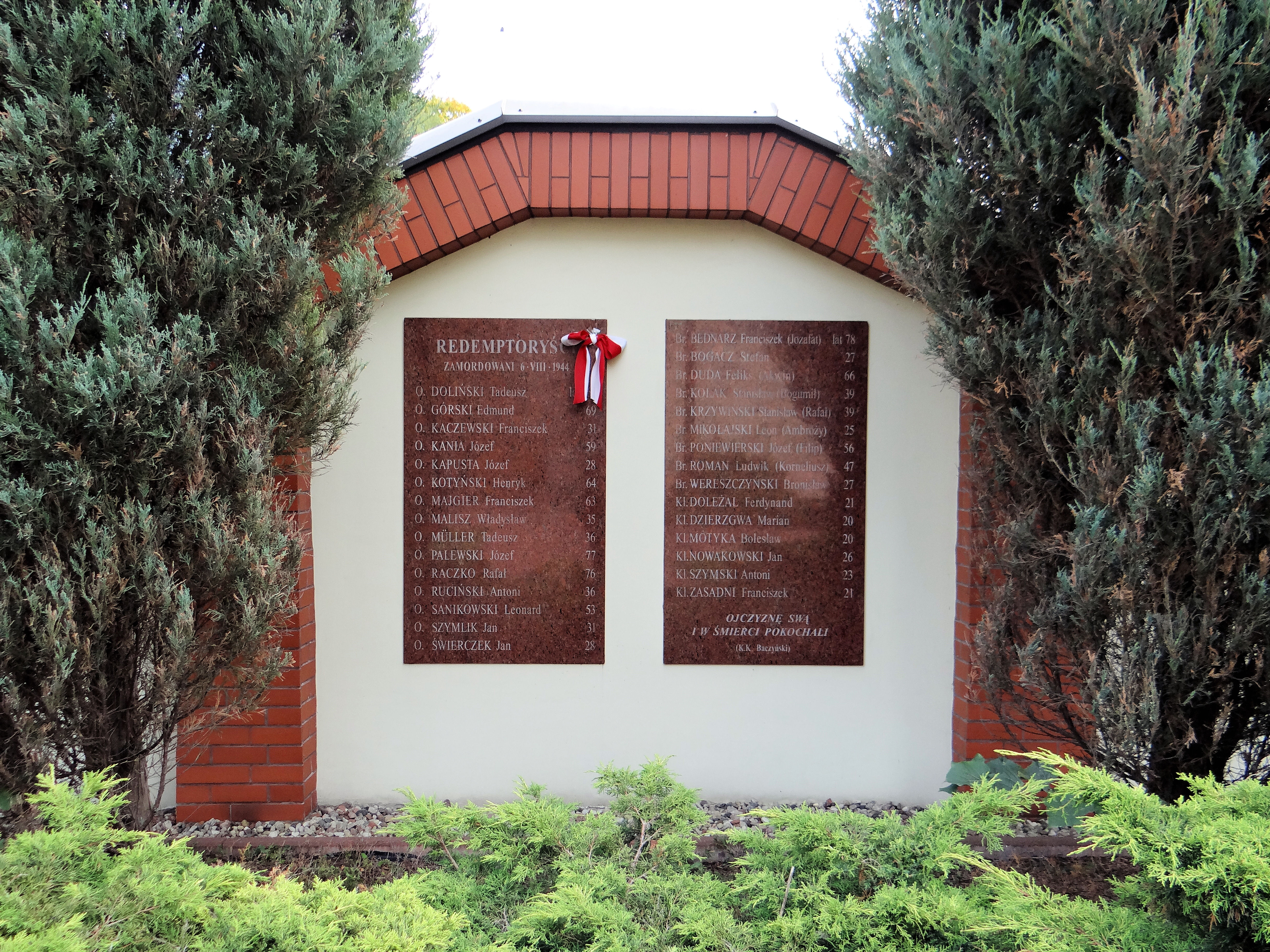 Kościół pod wezwaniem św Klemensa Hofbauera w Warszawie na Woli, przy ul. Karolkowej 49 - plac pamięci - tablica upamiętniająca ofiary II Wojny światowej Redemptorystów zamordowanych 6 sierpnia 1944 r